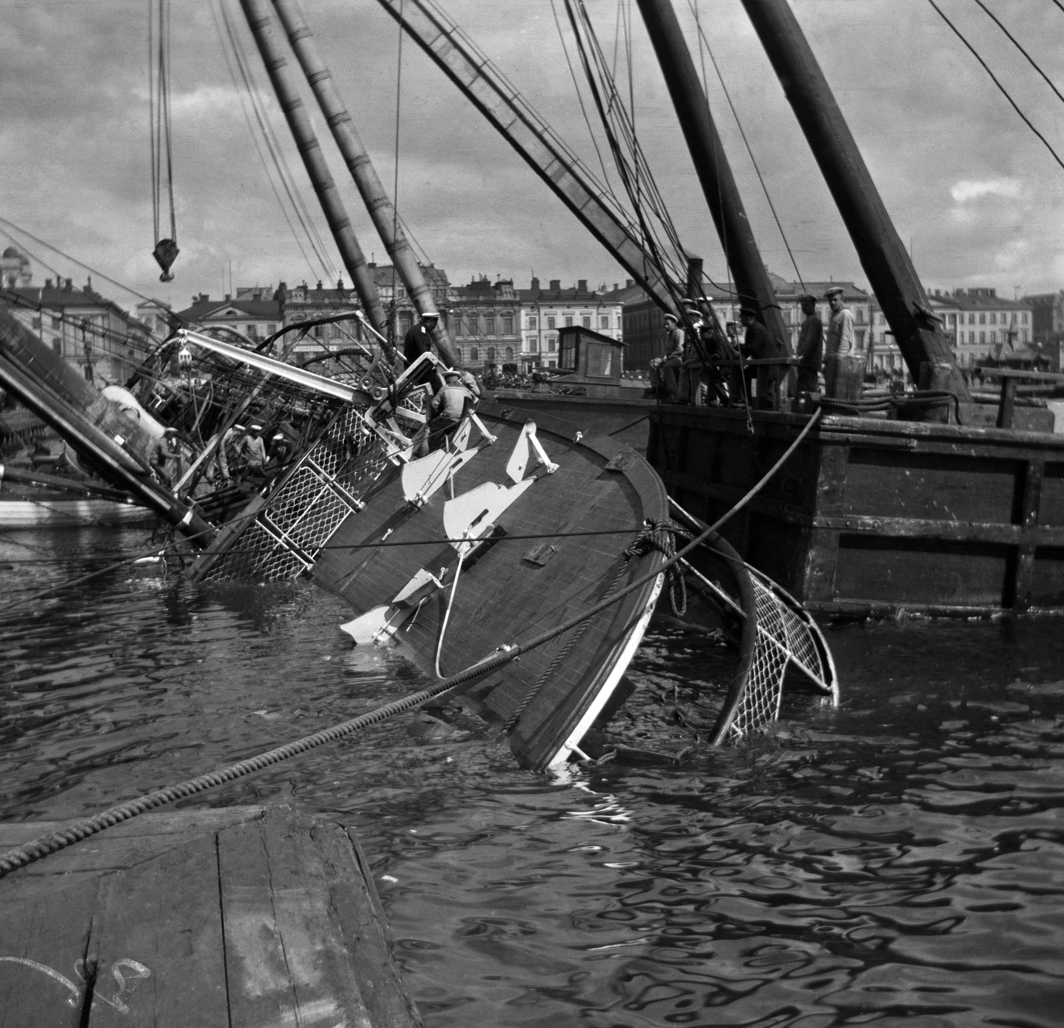 Eteläsatamassa tulipalossa vahingoittunut ss Bore